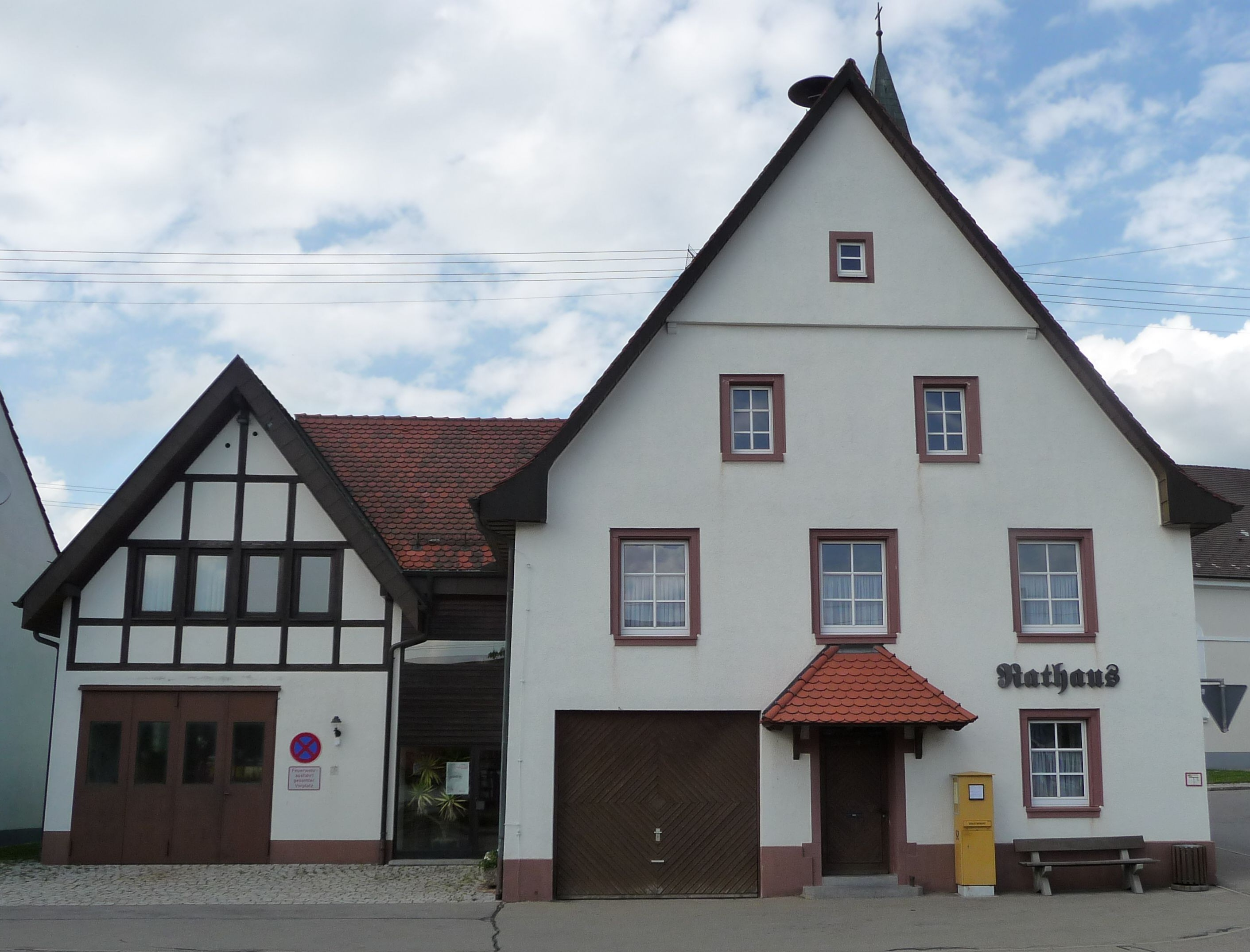 Rathaus und Feuerwehrmagazin